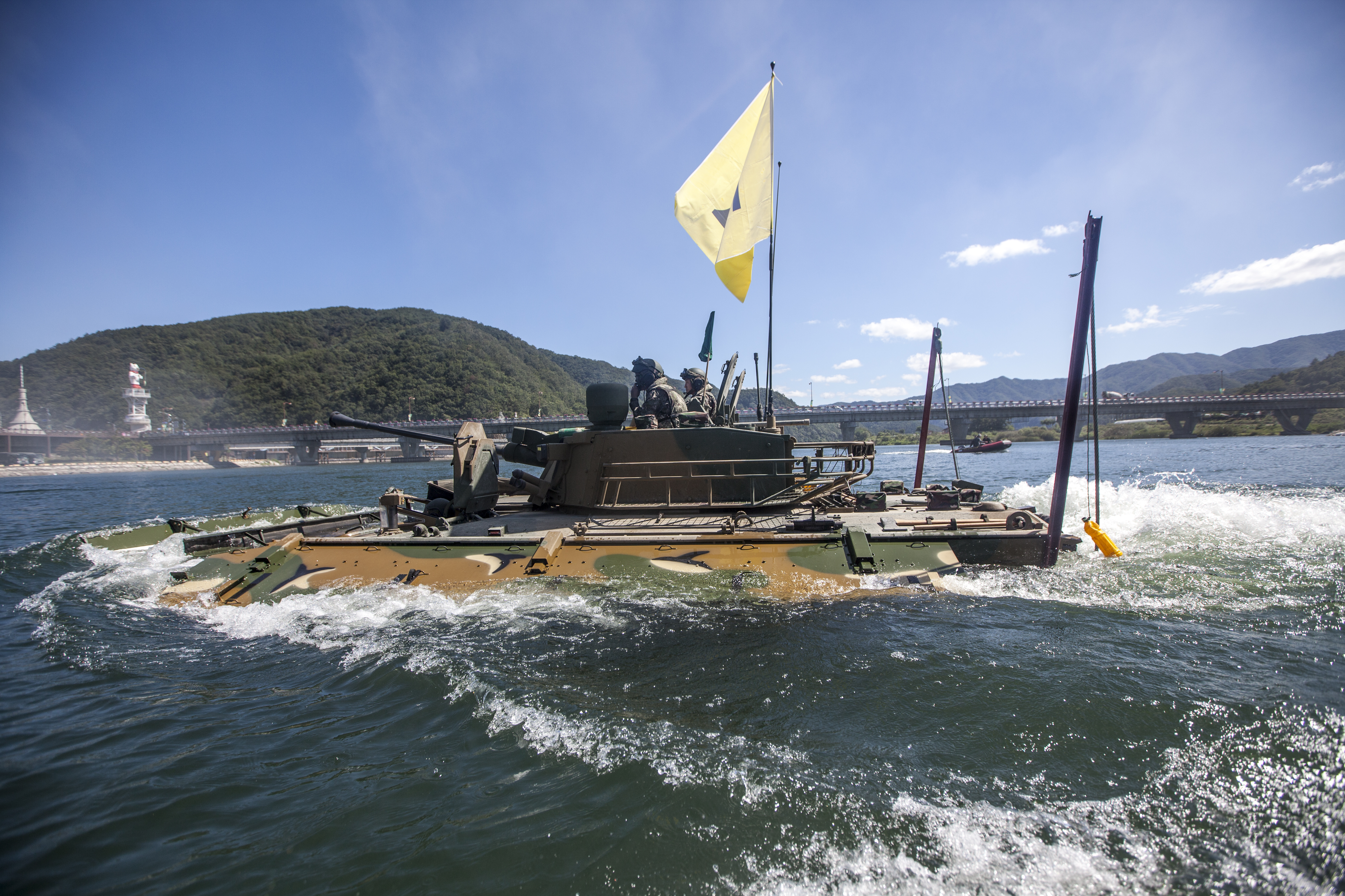 촬영 : 정승익